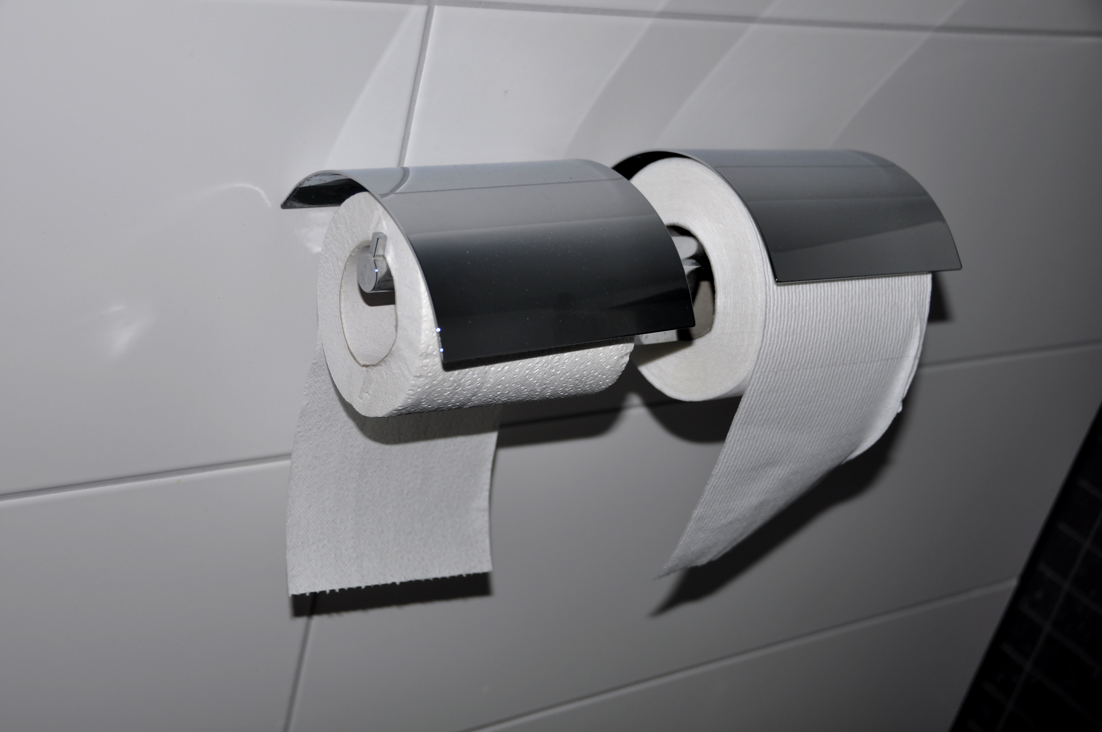 De een wil zijdezacht, de ander schuurpapier, de een wil papier van de muur af, de ander tegen de muur. Oplossing: twee rollen, nooit ruzie.